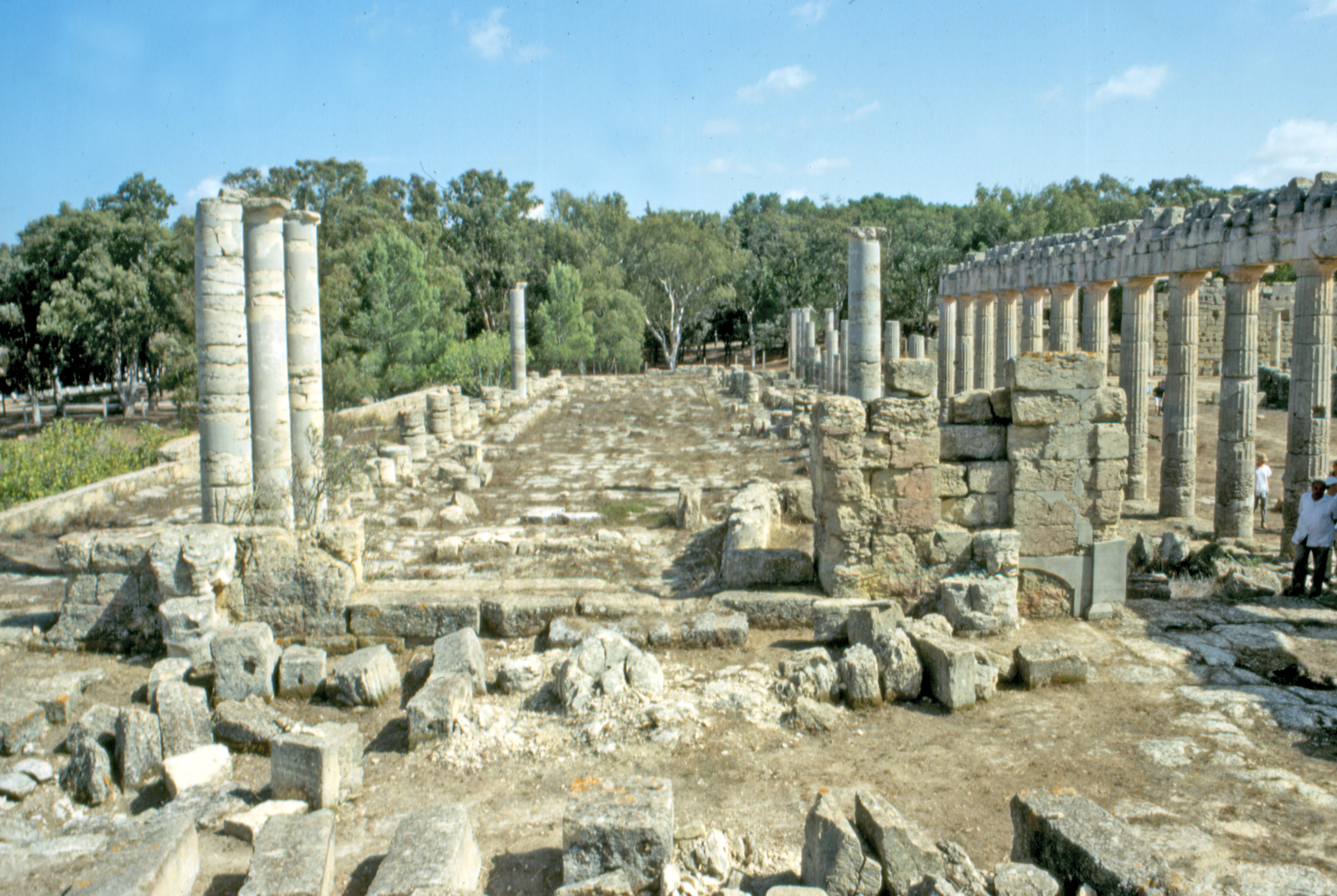 Libia, Cirene (sito archeologico), Cesareo trasformato in basilica cristiana